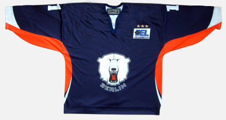 Heimtrikot der Eisbären Berlin in der Saison 08/09